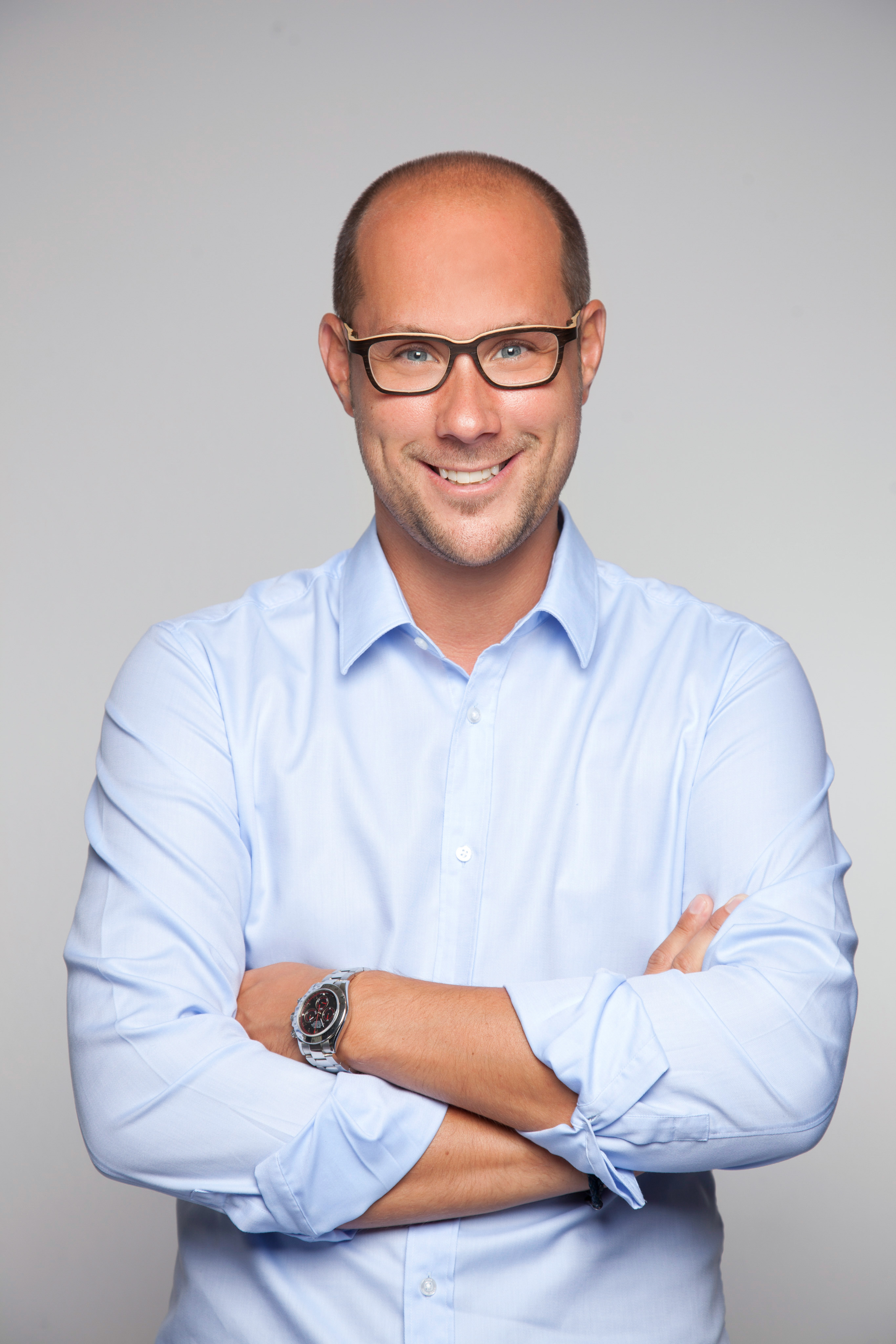 Mario Gerber ist Mehrheitseigentümer der Gerberhotels, Touristiker, Funktionär bei der Wirtschaftskammer Tirol und seit März 2018 Abgeordneter zum Tiroler Landtag (ÖVP).